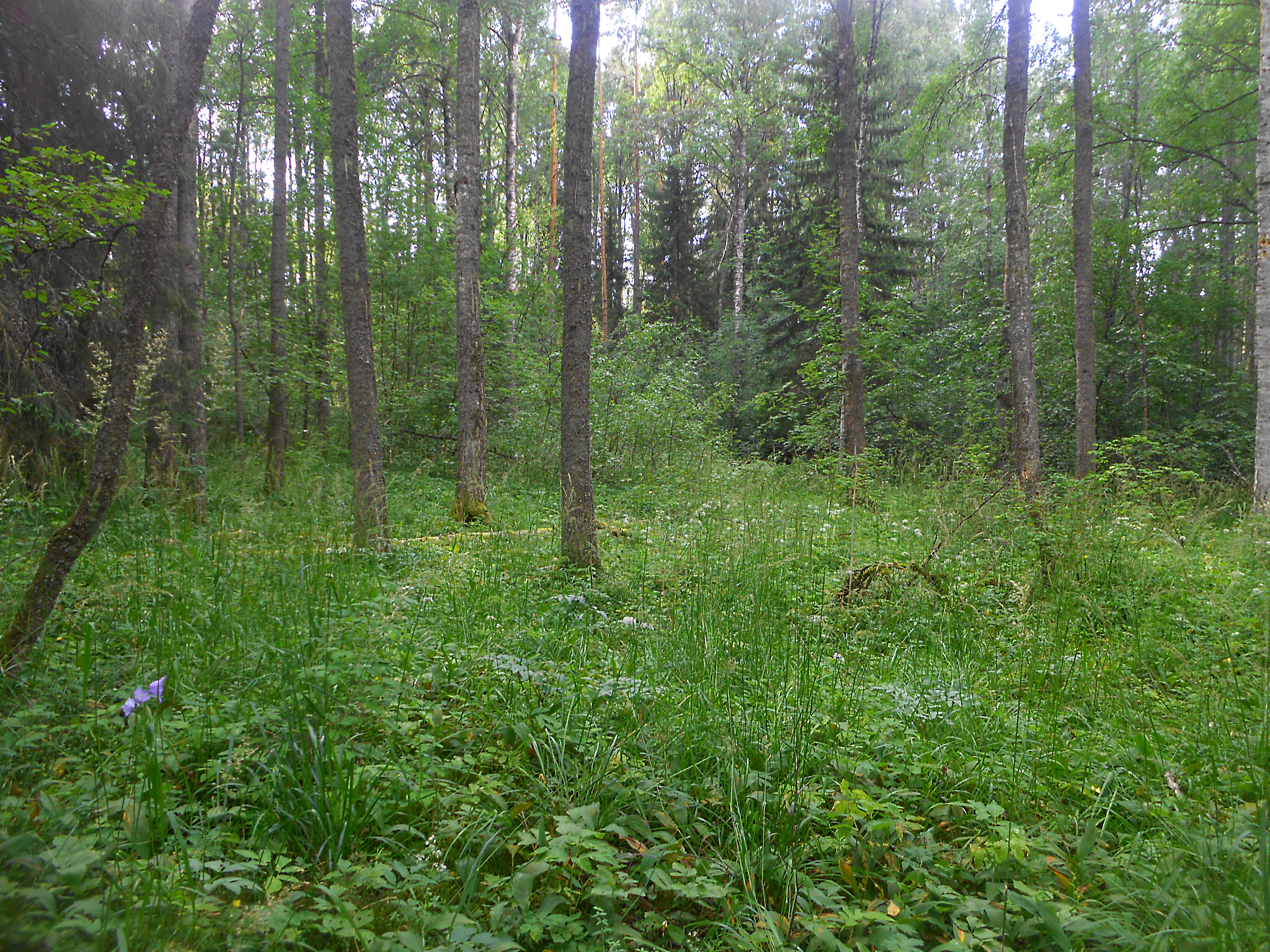 Kinissaaren lehtoa.